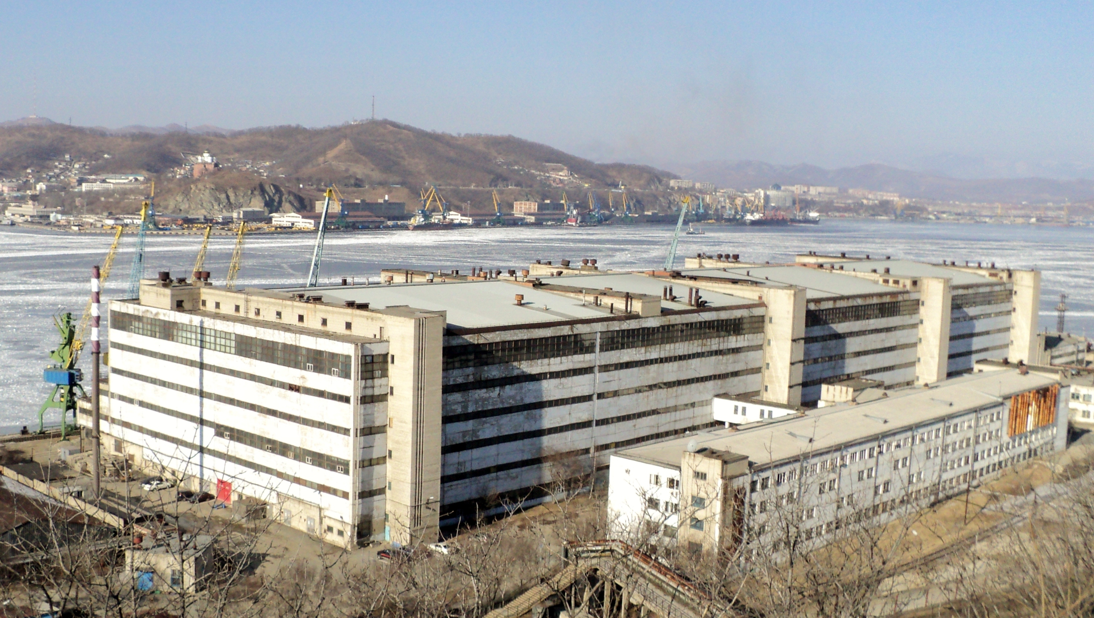 Находкинская жестянобаночная фабрика